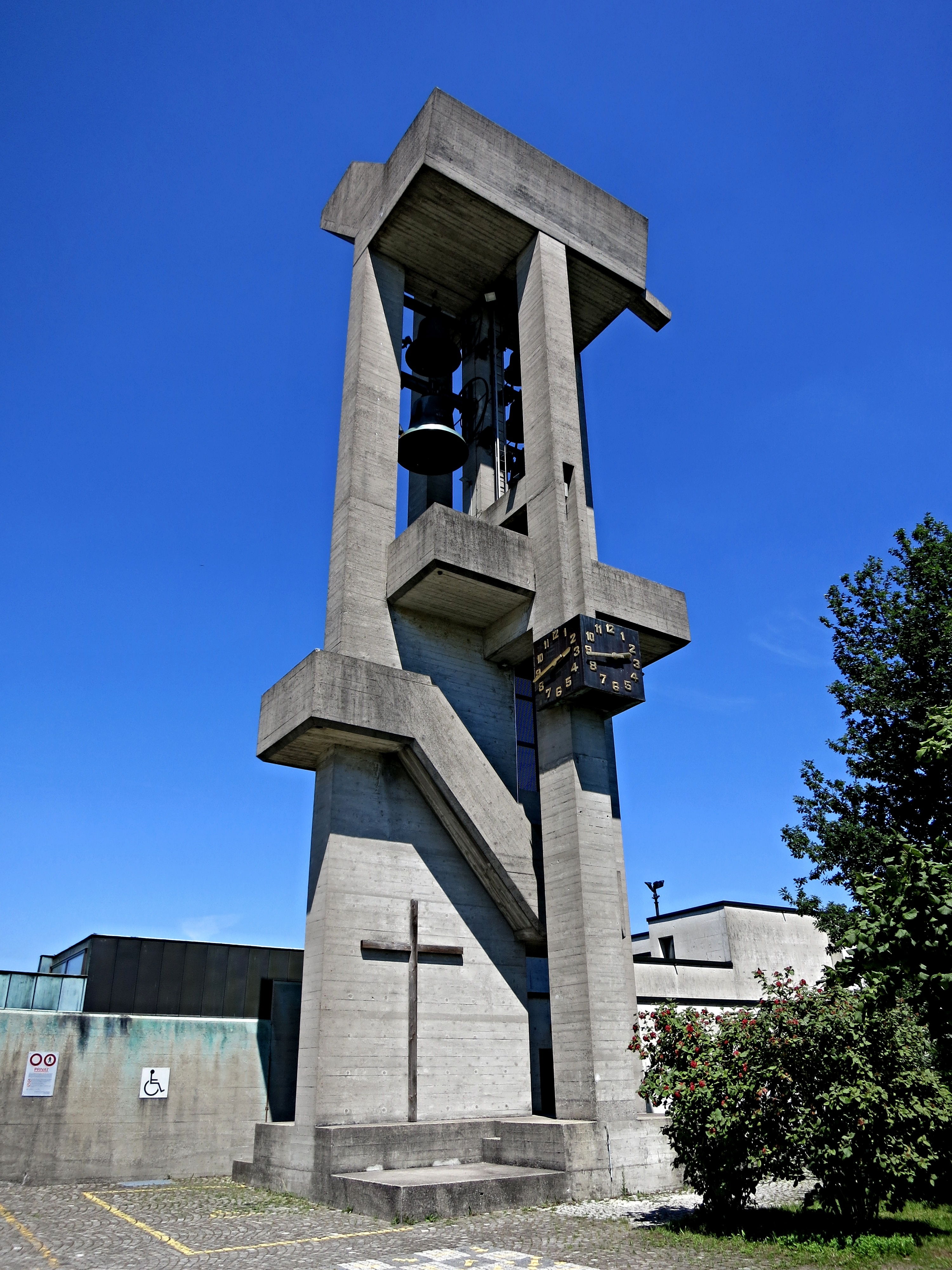 Effrektiker Glockenturm